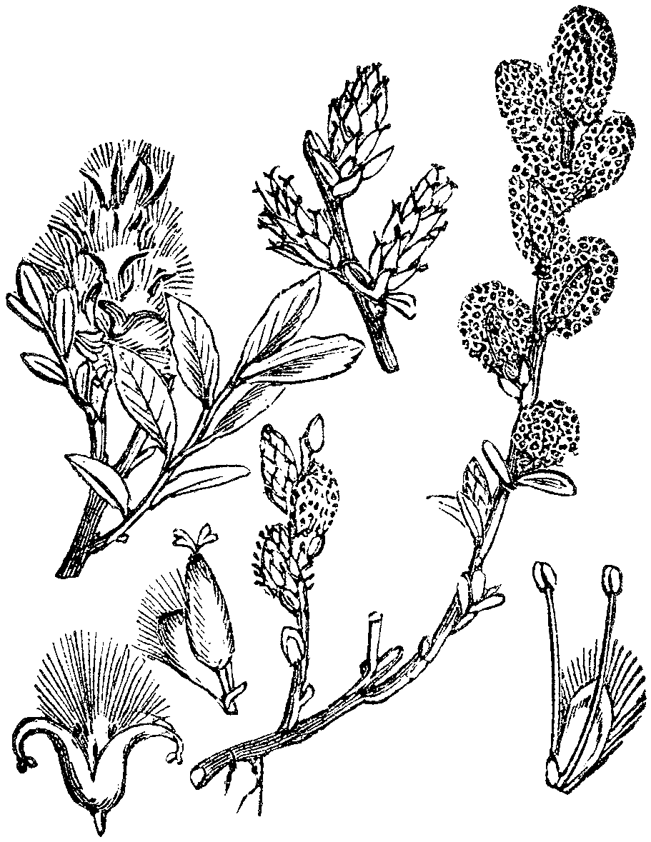 Slika 452. Plazeča vrba. (Sálix répens.)